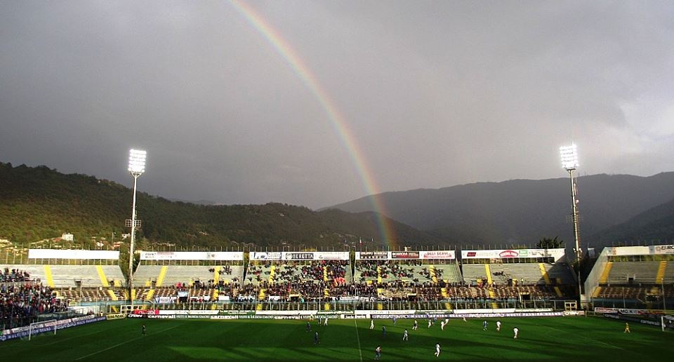 Fotografia scattata di persona, Stadio Mario Rigamonti di Brescia.